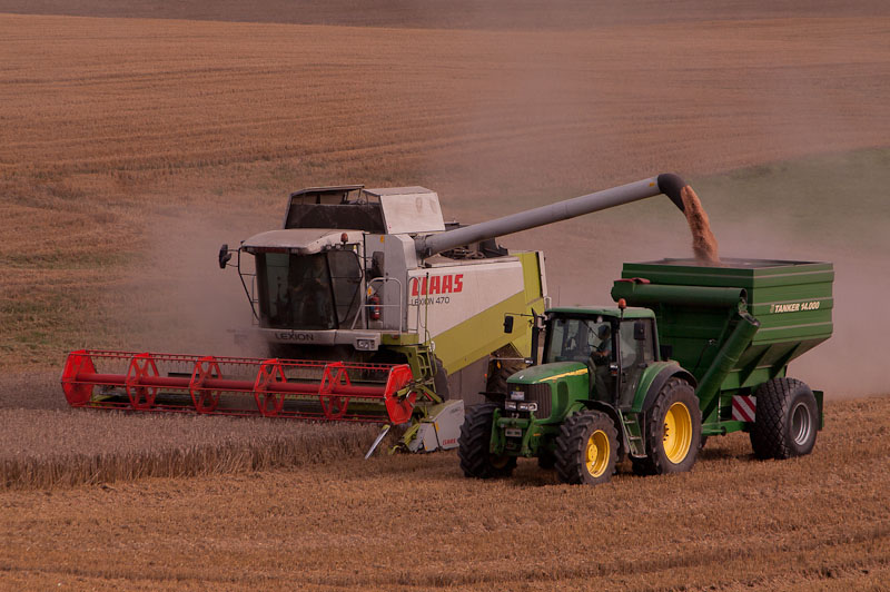 Claas-Mähdrescher Lexion 470 beim Abtanken während der Fahrt auf einen Überladewagen Tanker 14.000 des brasilianischen Herstellers Jan, der von einem John-Deere-Traktor 6920 mit 190 PS gezogen wird. (Das Logo JJJ auf dem Überladewagen verweist vermutlich darauf, dass das Fahrzeug von Jürgensen Landtechnik nach Deutschland importiert wurde.)